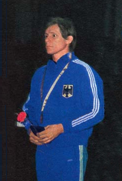 Mario Sabatini